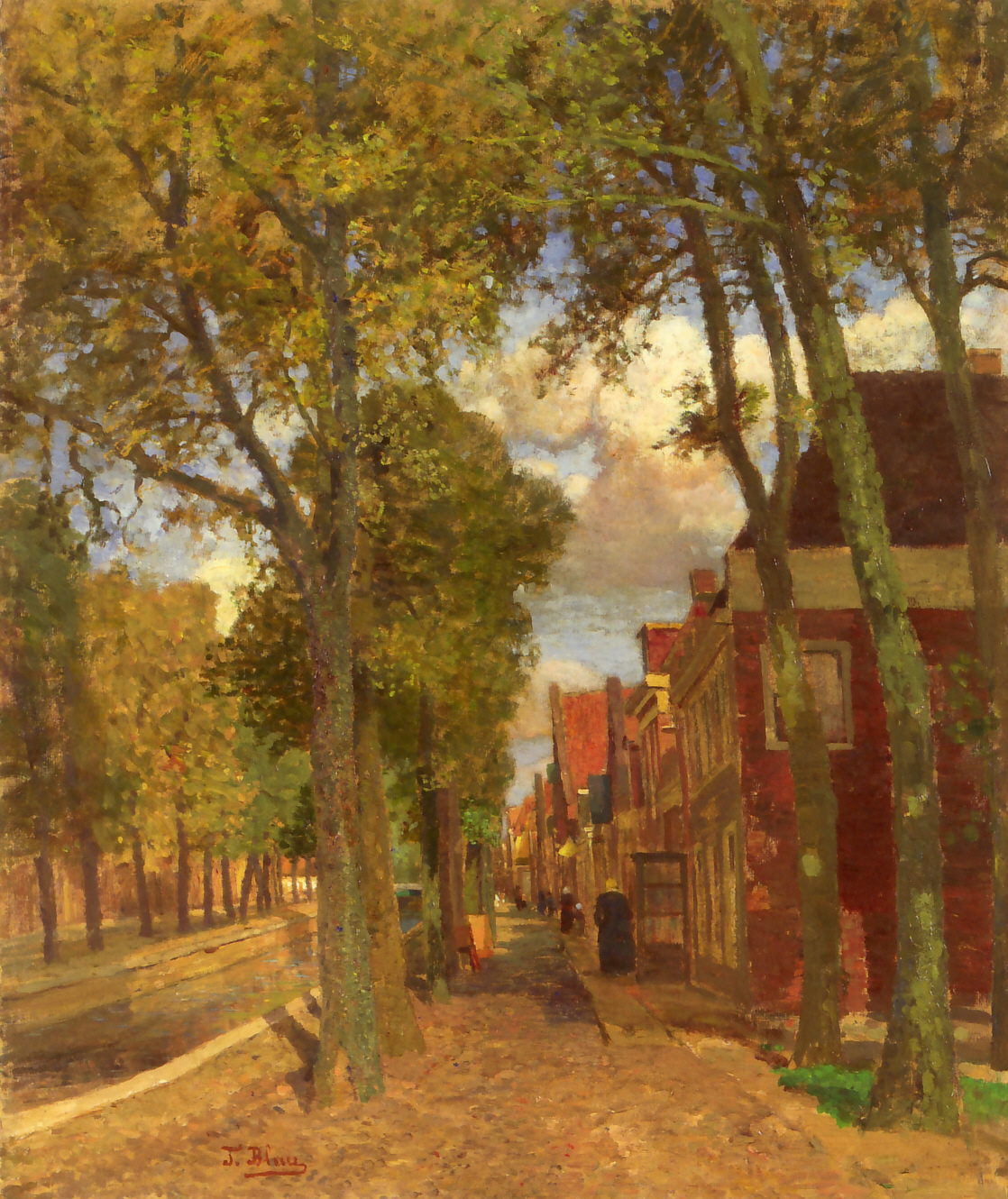 Kanal in Friesland (1908)